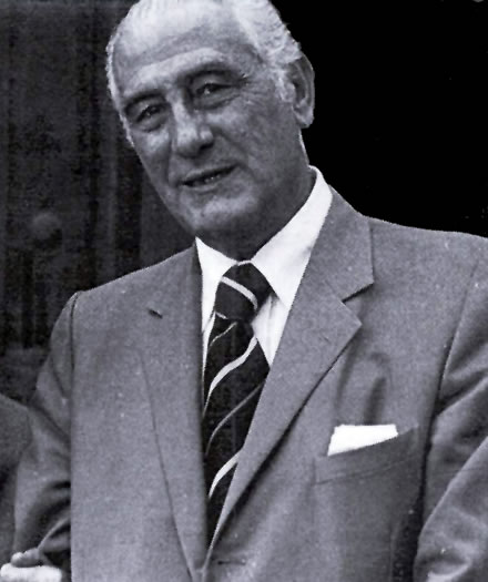 Archivo José Luis Jiménez Jerez de Cine